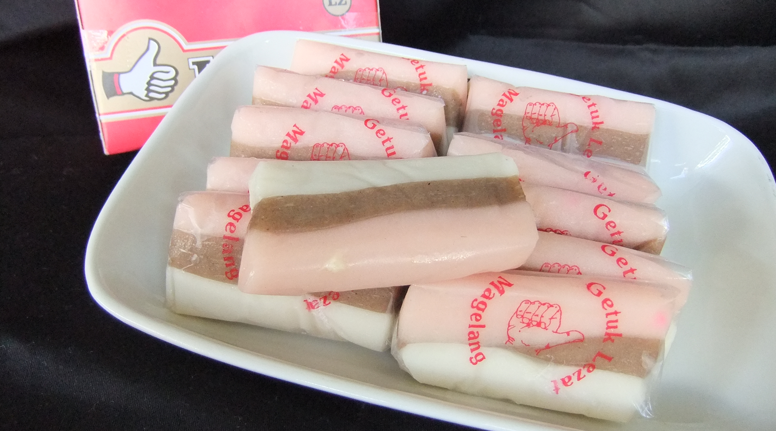 Getuk dari Magelang